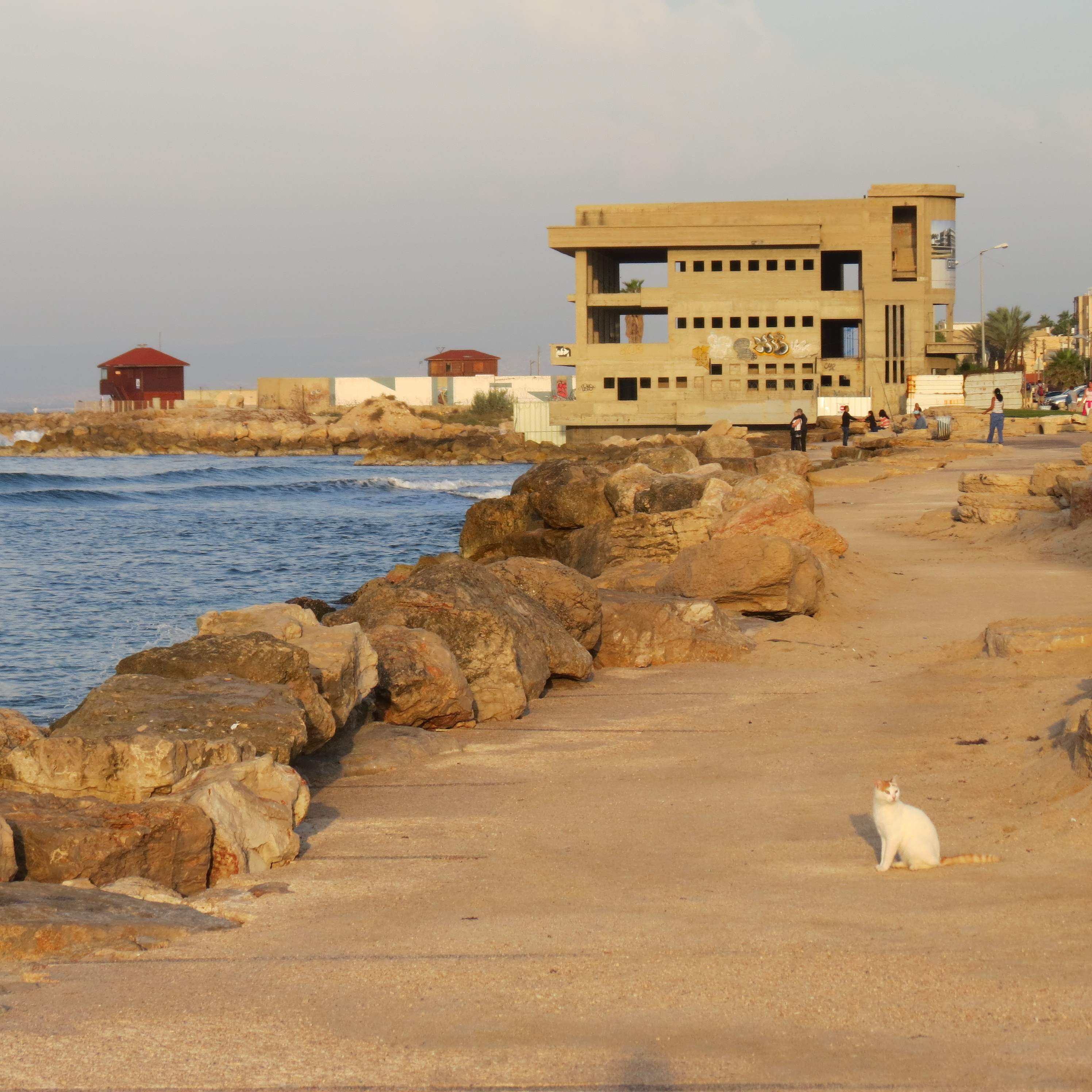 קזינו בת גלים היה מבנה בשכונת בת גלים בחיפה ששימש לפעילויות קהילה ופנאי משנות ה-30 של המאה ה-20, אך נהרס לאחר שנים, וכיום ניצב במקומו שלד בטון. חרף שמו, לא שימש המקום מעולם כקזינו.